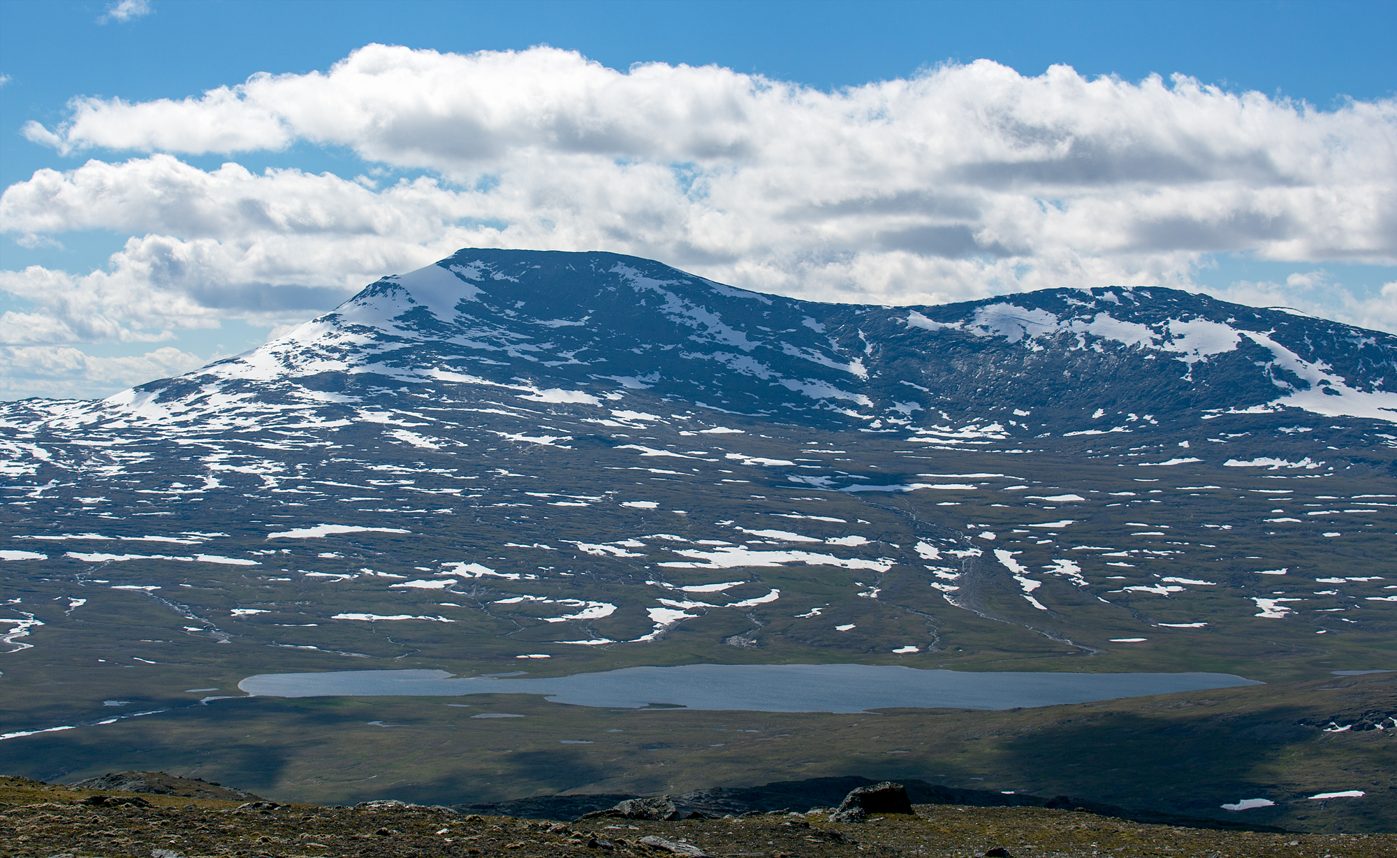 Jållejávrre med Jiegŋáffo i bakgrunden - vy från 1356 på Gierggevárre.